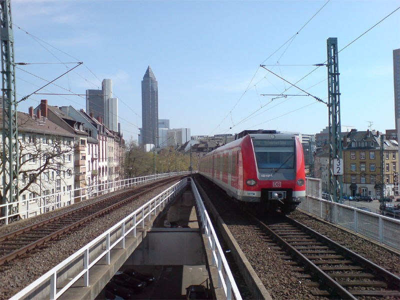 Frankfurt am Main - Westbahnhof, Auffahrt zum Hochbahnhof (Gleis 1 und 2), ET 423, Linie S5